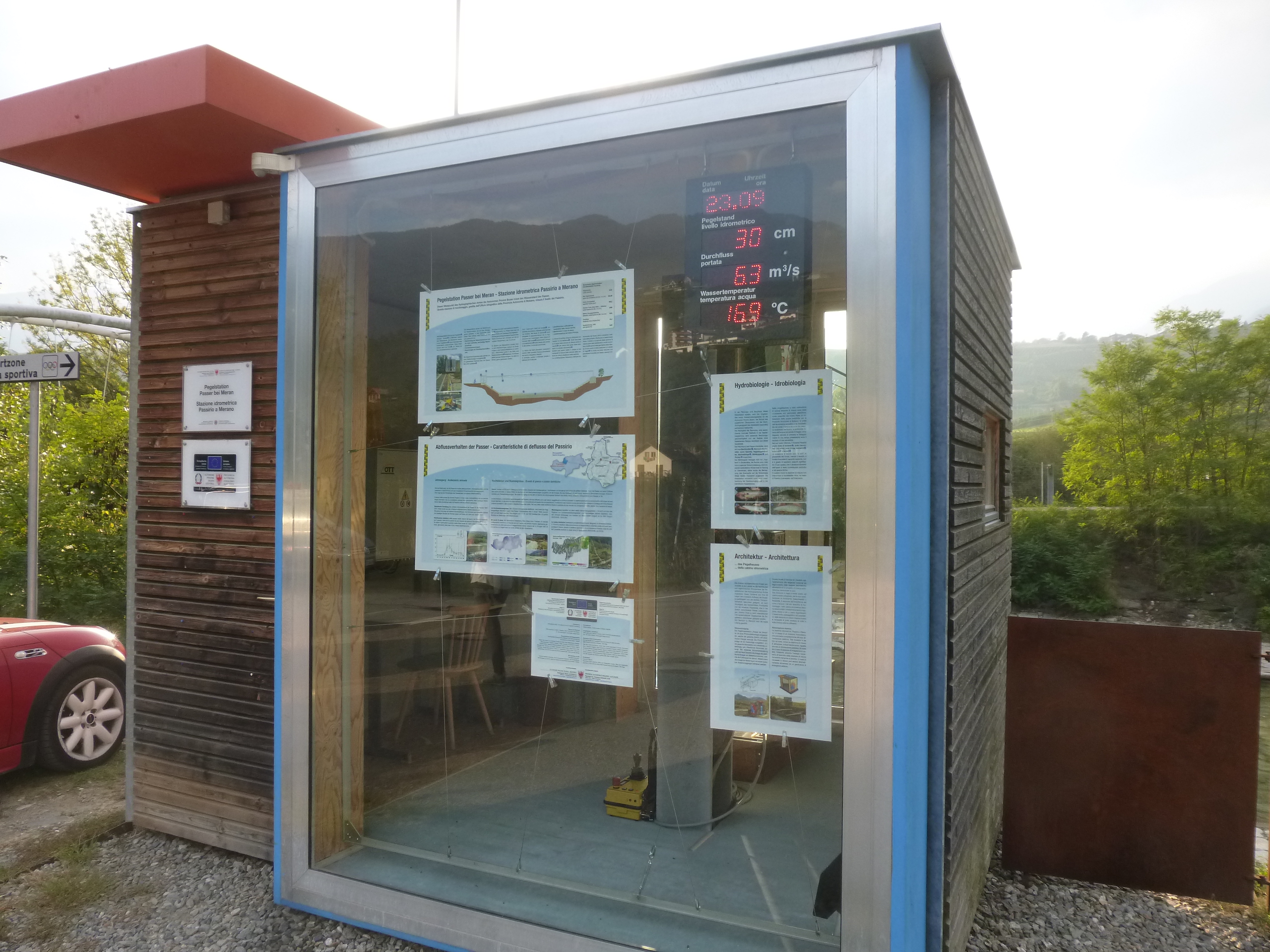 Passer Pegelstation bei Meran